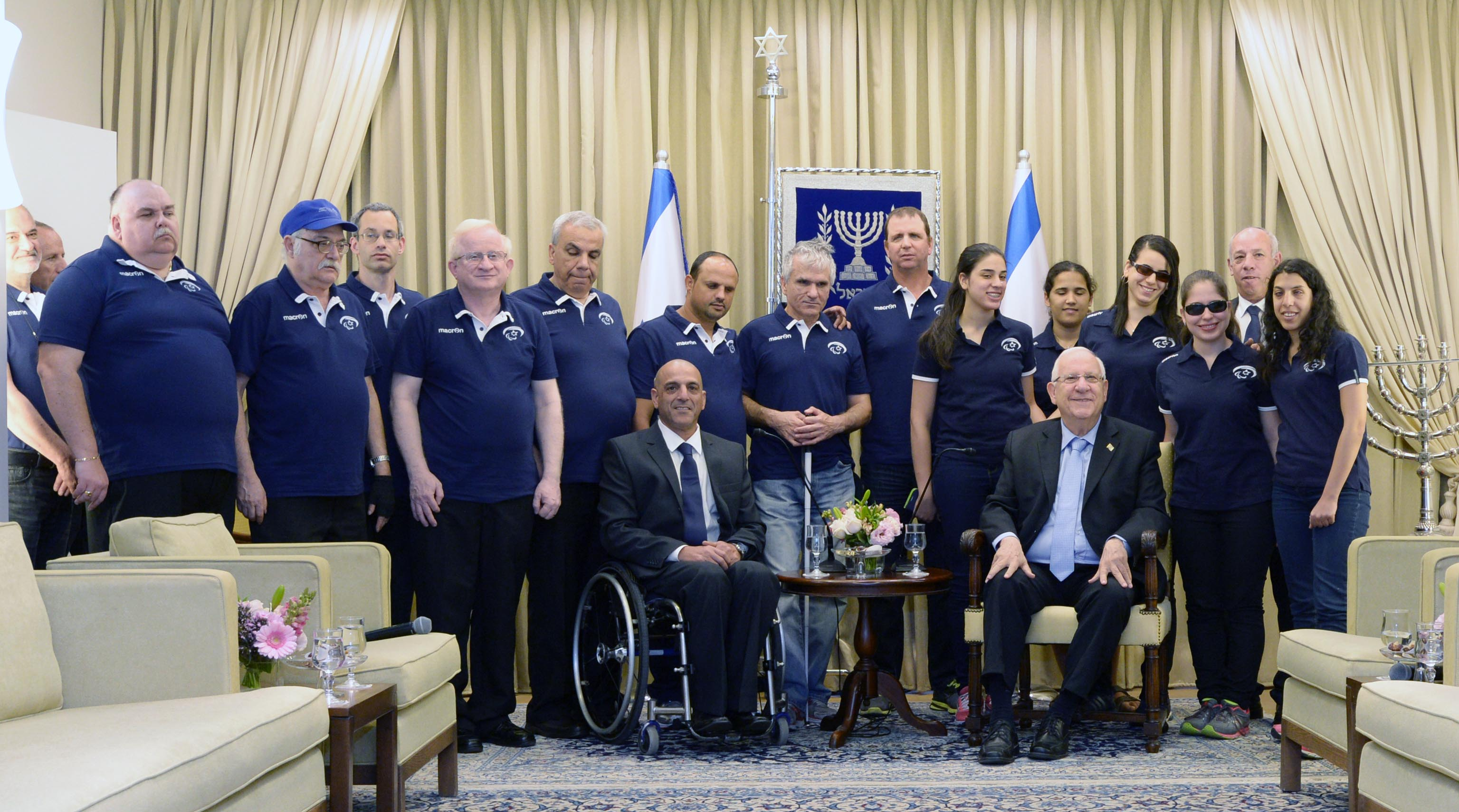 משלחת הספורטאים העיוורים שייצגו את ישראל במשחקים הפראלימפיים בסיאול באירוח בבית נשיא מדינת ישראל ראובן ריבלין